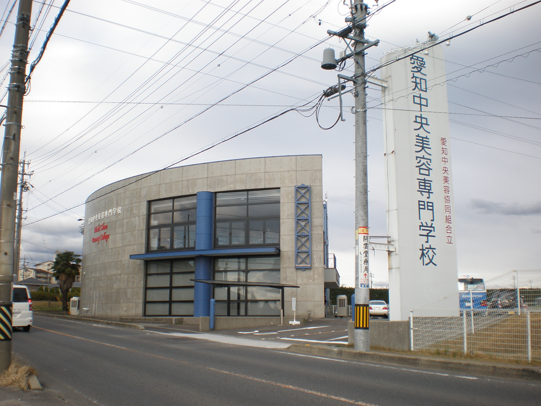 愛知県小牧市にある愛知中央美容専門学校